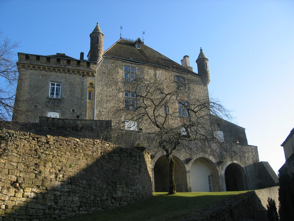 Chateau de Frontenay dans le Jura ( France )